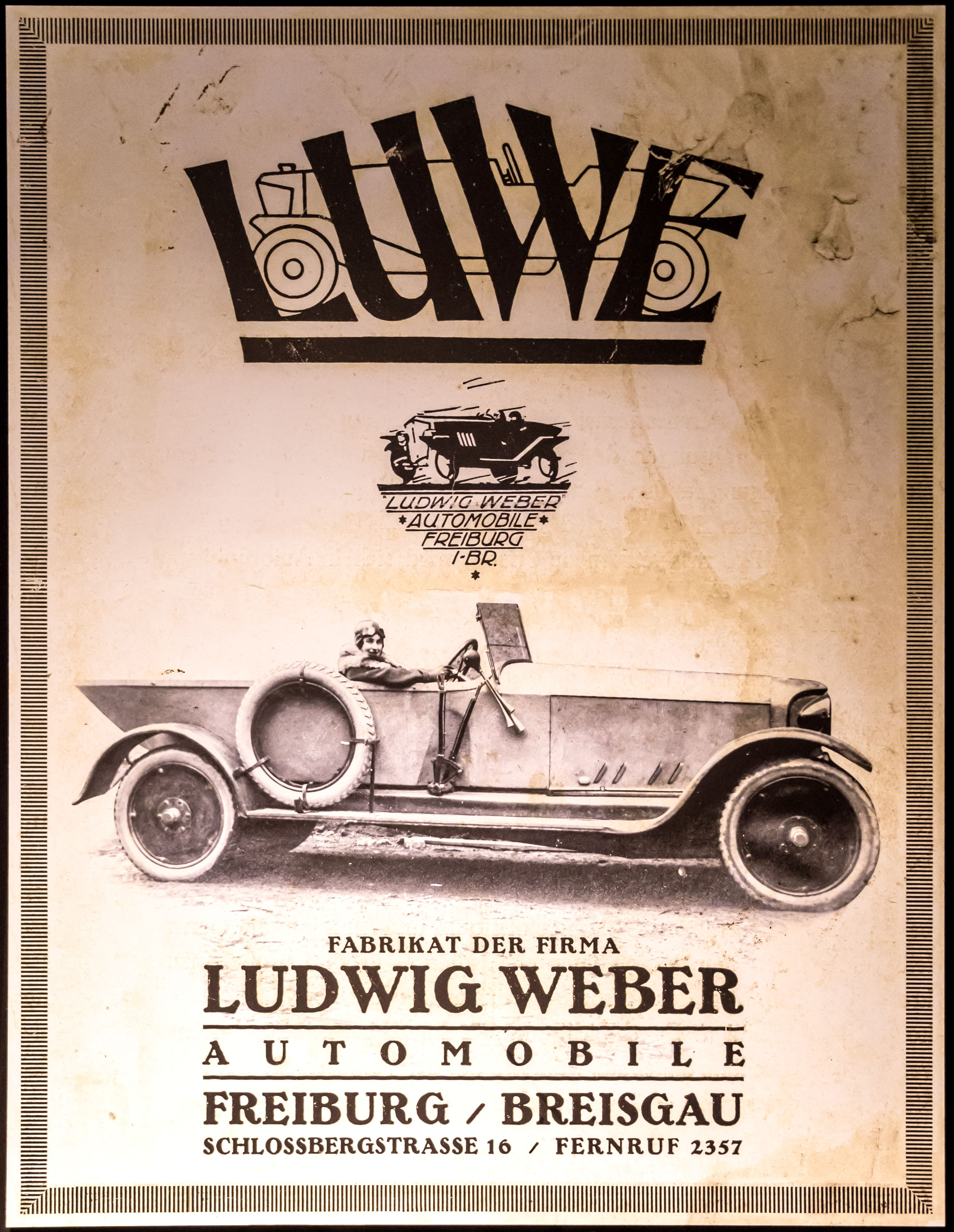 Ein LUWE Motorrad aus dem Jahre 1931, das im Oldtimer Museum Volante in Kirchzarten ausgestellt ist.. Es ist eins der späteren Modelle, die bei der Firma Wunderle in Kirchzarten montiert wurden.